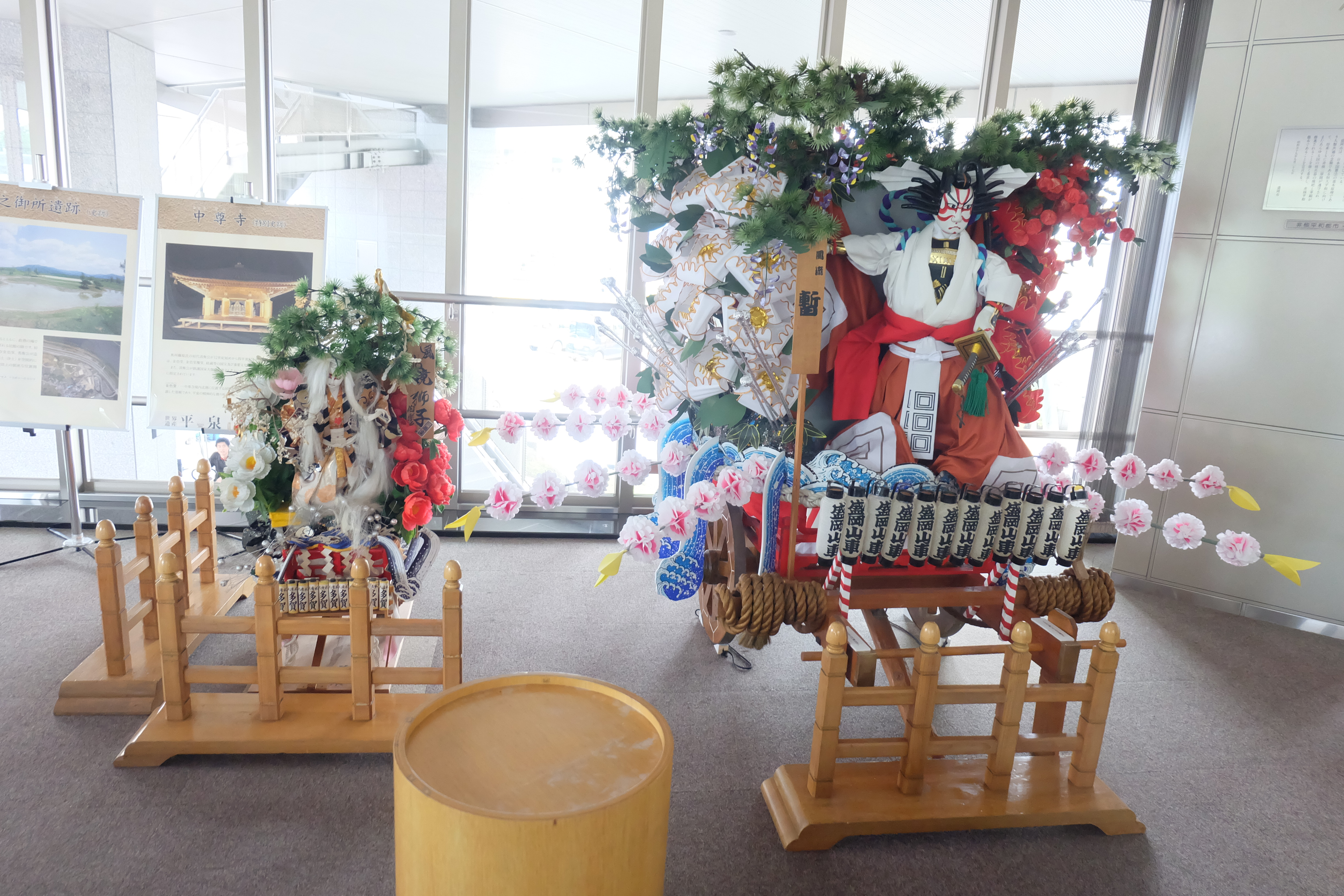 ミニ山車